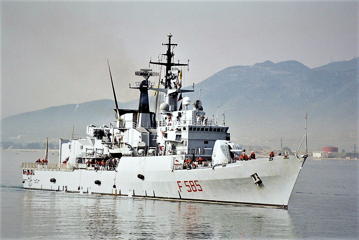 Il Pattugliatore Granatiere a Malaga